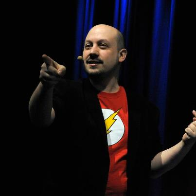 El mago Woody Aragón durante una de sus actuaciones